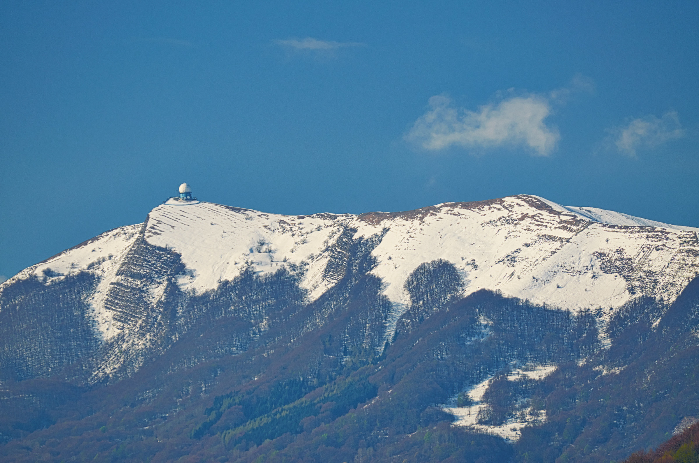 Lesima, telefoto